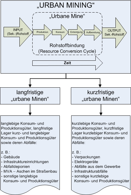 Das relevante Unterscheidungsmerkmal bei der Betrachtung urbaner Minen ist - im Sinne einer Lebenszyklusbetrachtung - der Zeitraum der Freisetzung der Ressourcen, d. h. der Zeit-raum wie lange die in Konsum- und Produktionsgüter verwendeten Rohstoffe zeitlich gebun-den sind (Resource Conversion Cycle). Je nach Verwendungszeitraum lassen sich die verschiedenen Lager in lang- und kurzfristige urbane Minen unterscheiden.